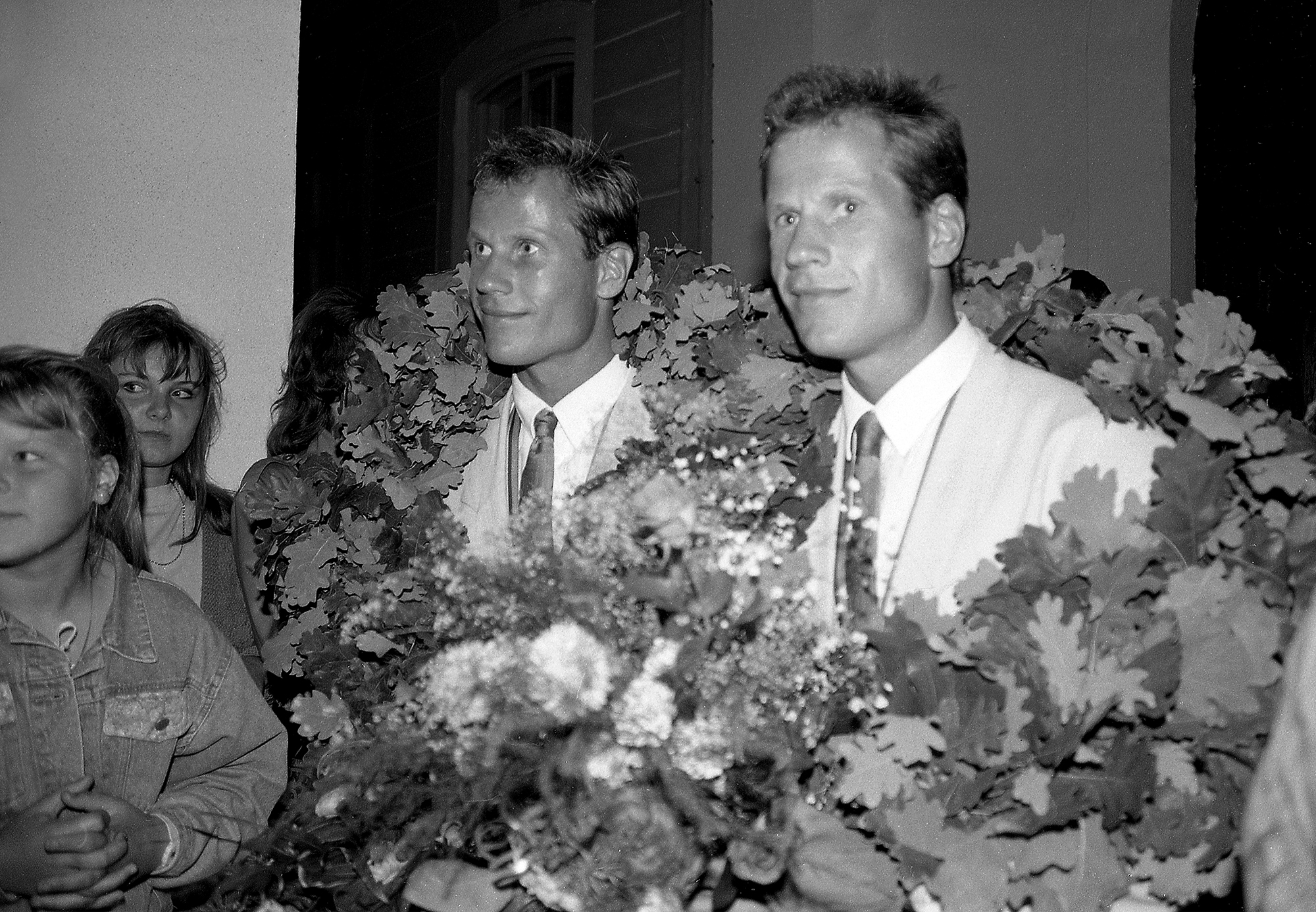 Toomas ja Tõnu Tõniste vastuvõtt peale Barcelona pronksi Raekoja platsil 1992